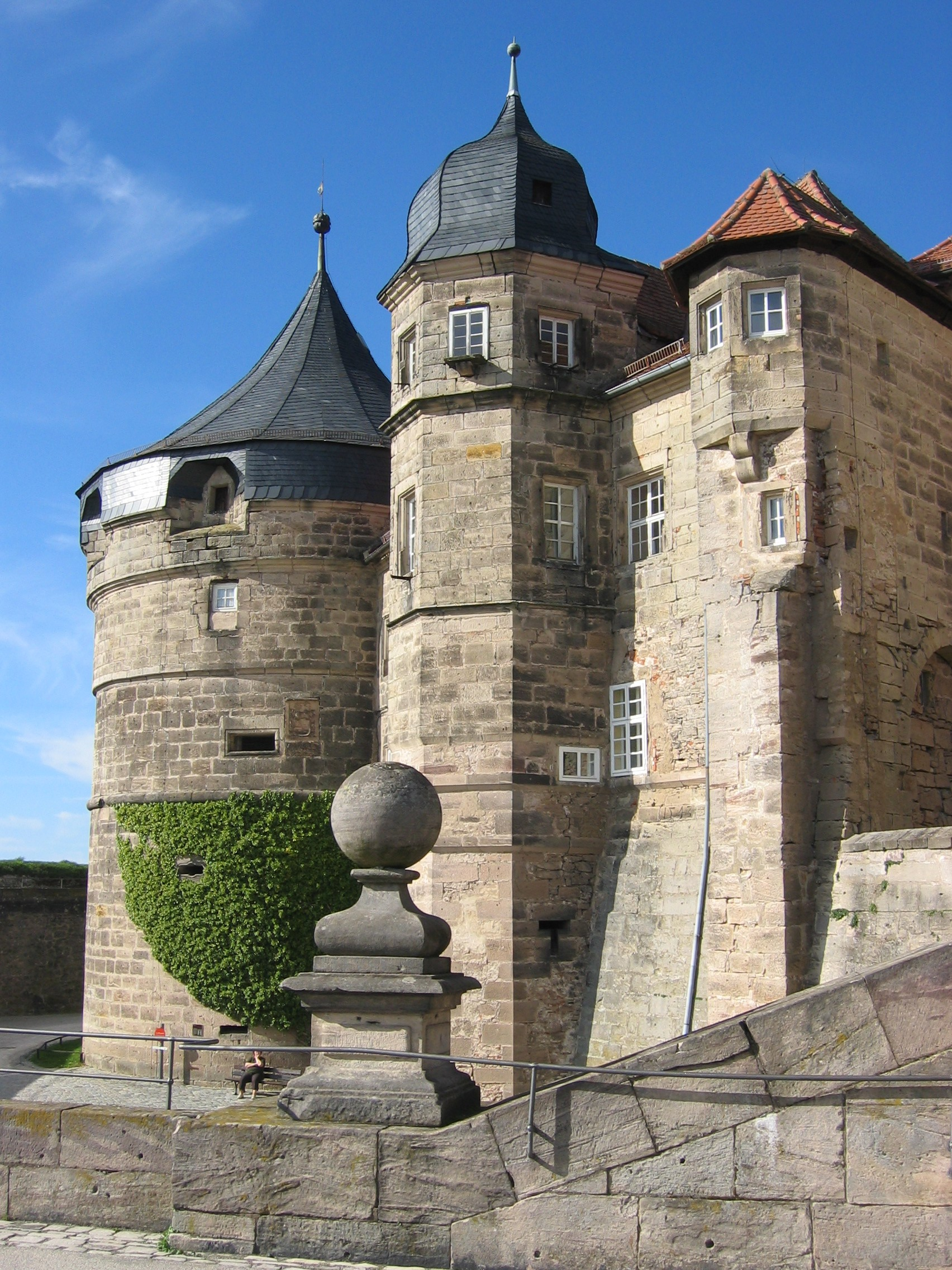 Kronach - Festung Rosenberg - Dicker Turm und Kapitänsturm